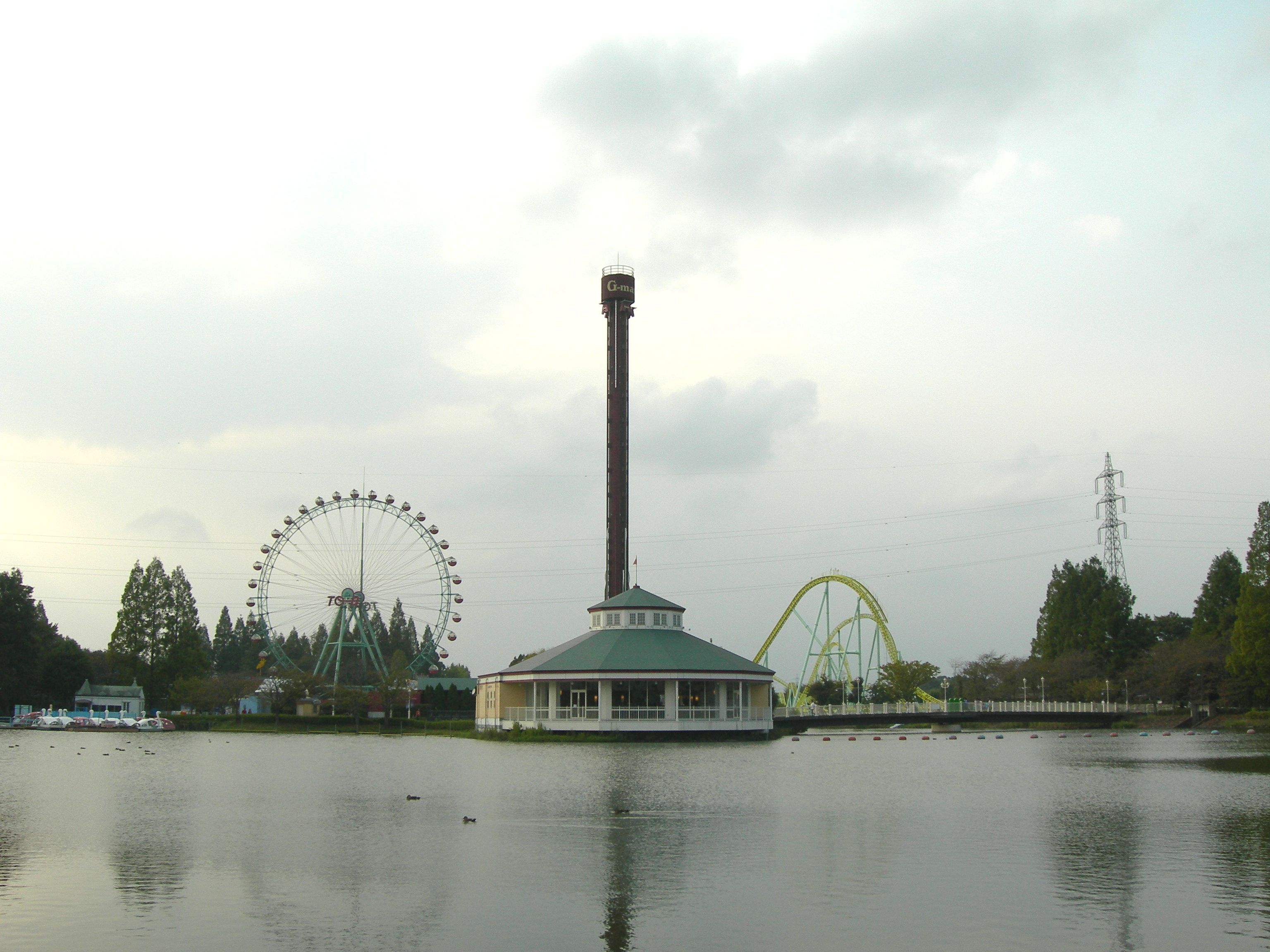 東武動物公園 白鳥の池